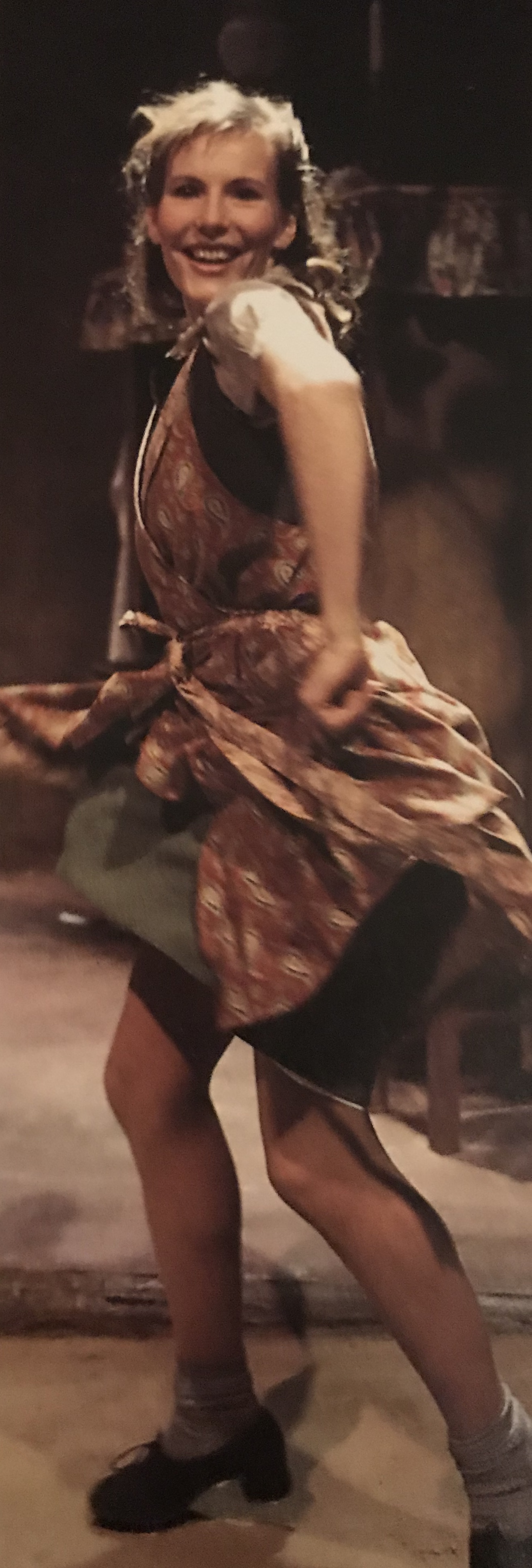 Brian Friel, Odense Teater